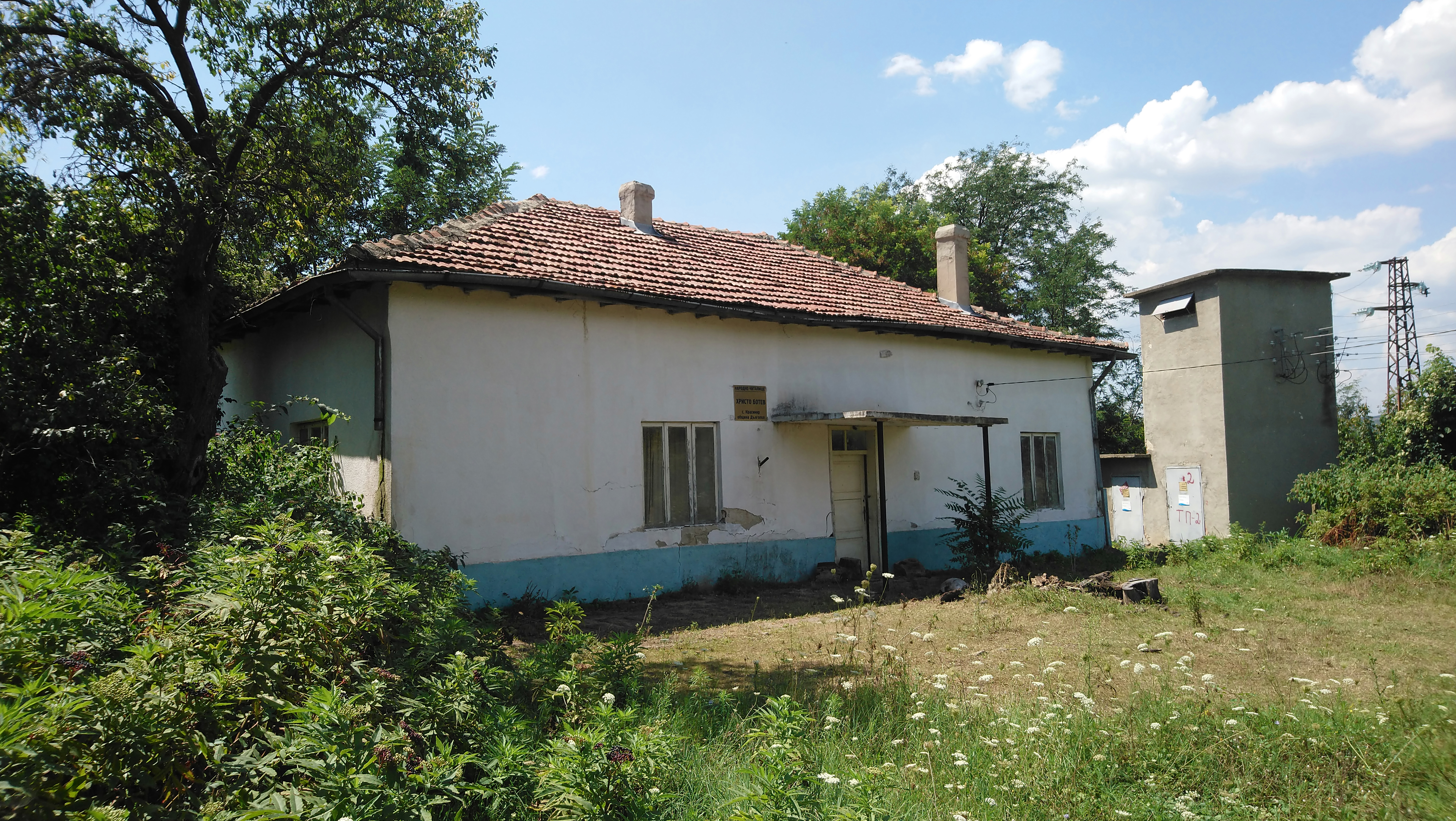 Село Красимир - община Дългопол - читалище Христо Ботев